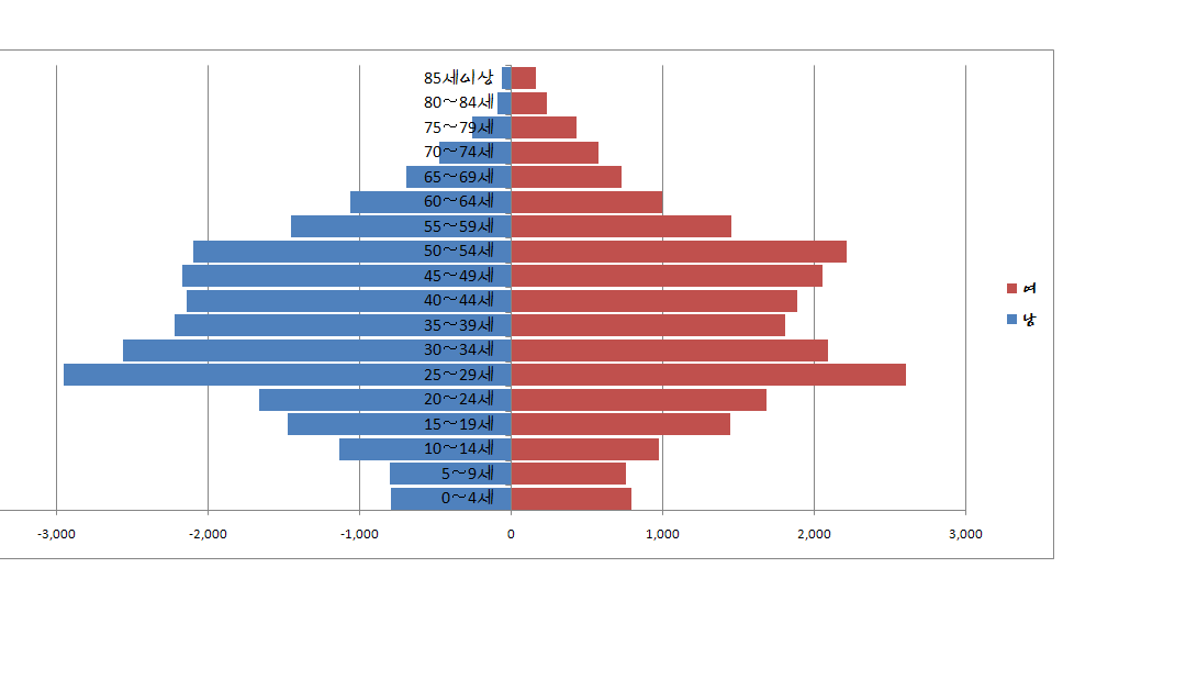 부천시 심곡동 인구구조 2010년기준